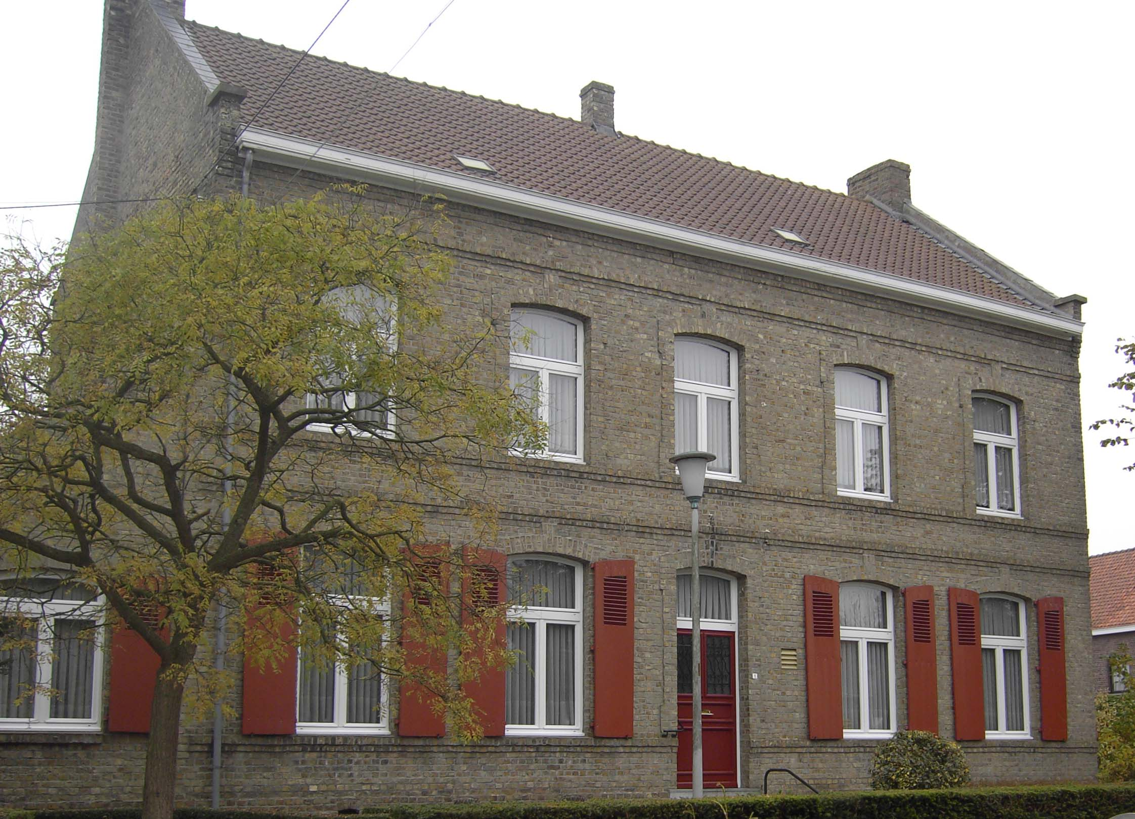 Zillebeke (Ypres) - Rectorie.